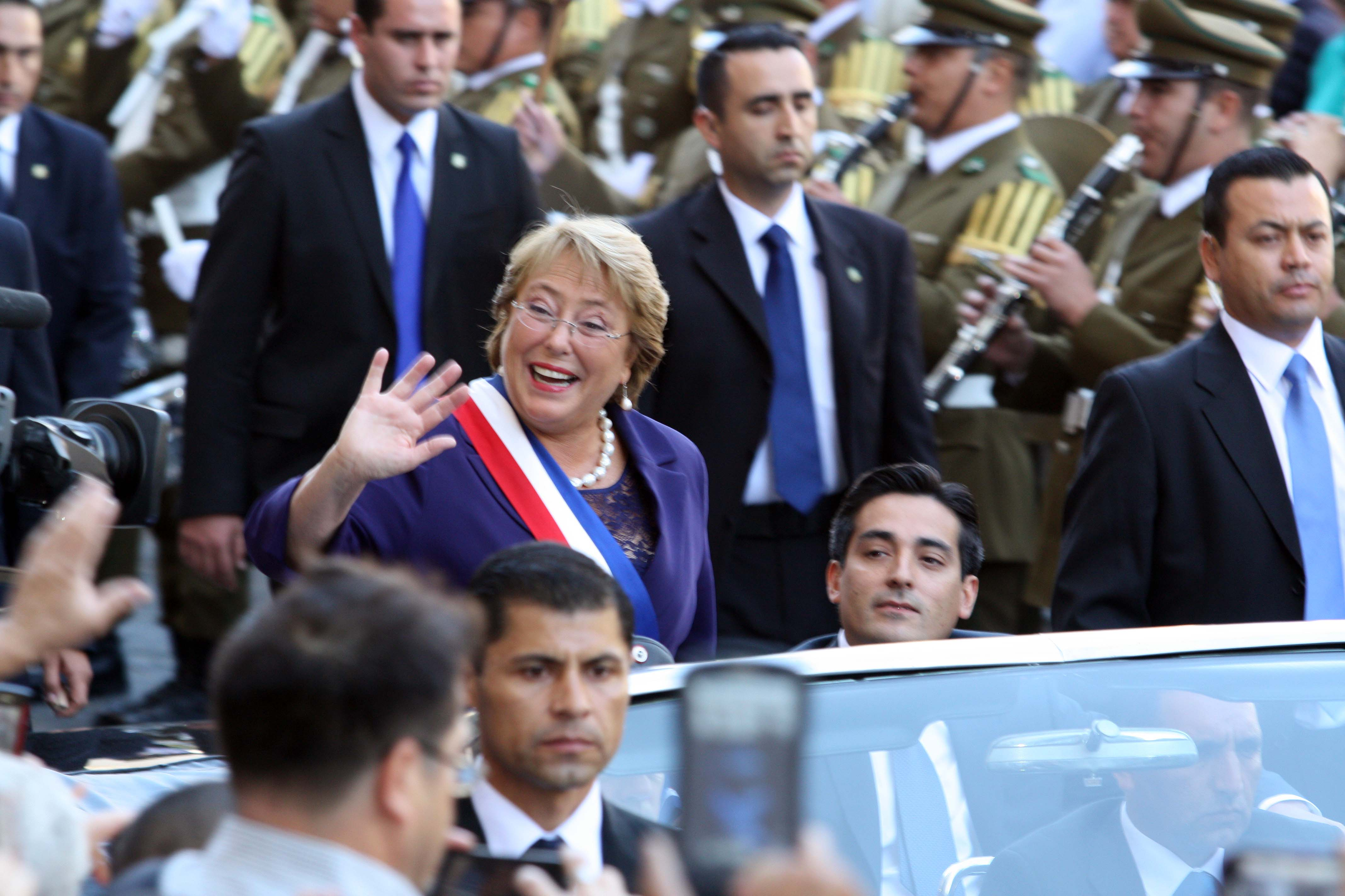 Presidenta Michelle Bachelet tras asumir el segundo mandato presidencial